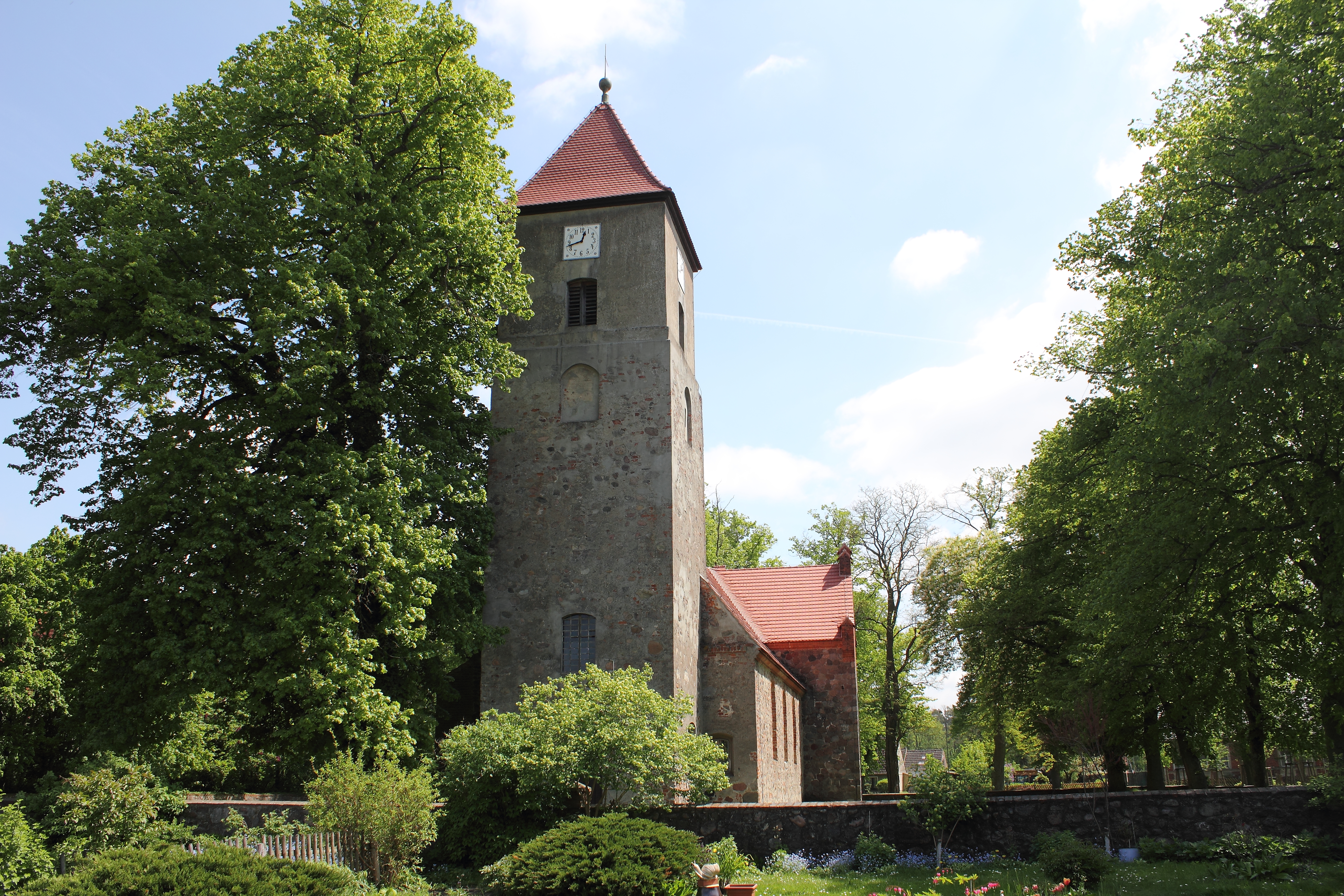 Church of Menz (Stechlin), Germany